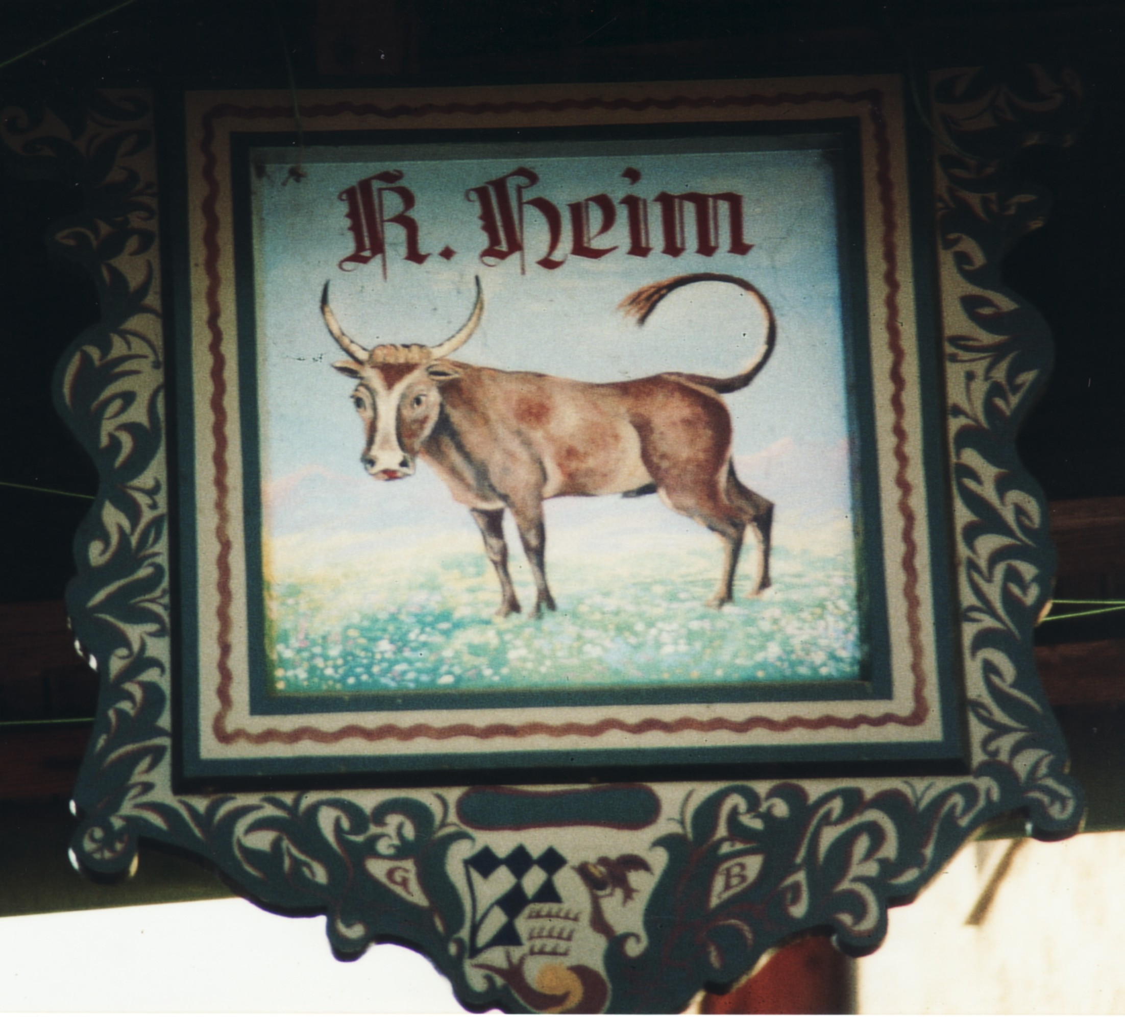 Walddorfhäslach-Walddorf ehemaliger Gasthof zum Ochsen, verschollenes Wirtshausschild